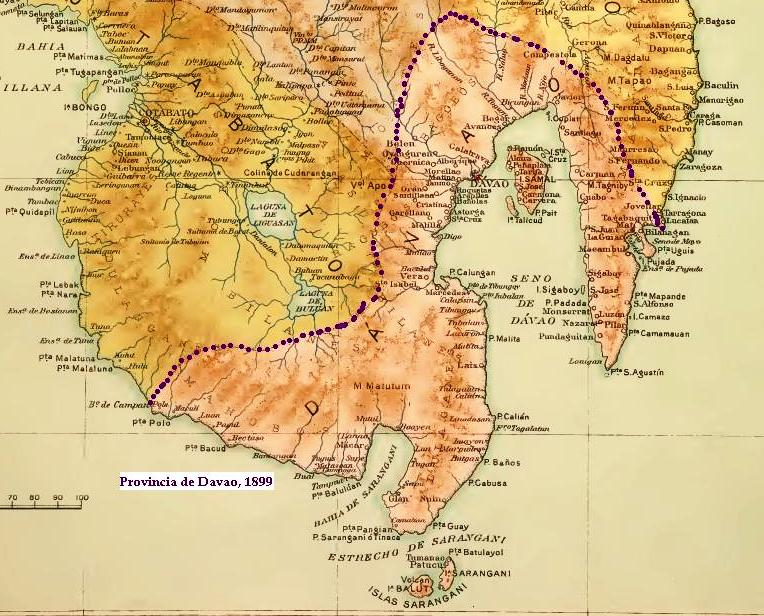 Fragmento del mapa de la página 81 del Atlas